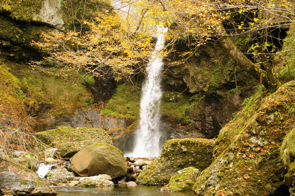 Ane fall